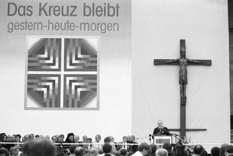 Demonstration gegen das Karlsruher Kruzifix-Urteil am 25. September 1995 am Münchner Odeonsplatz.